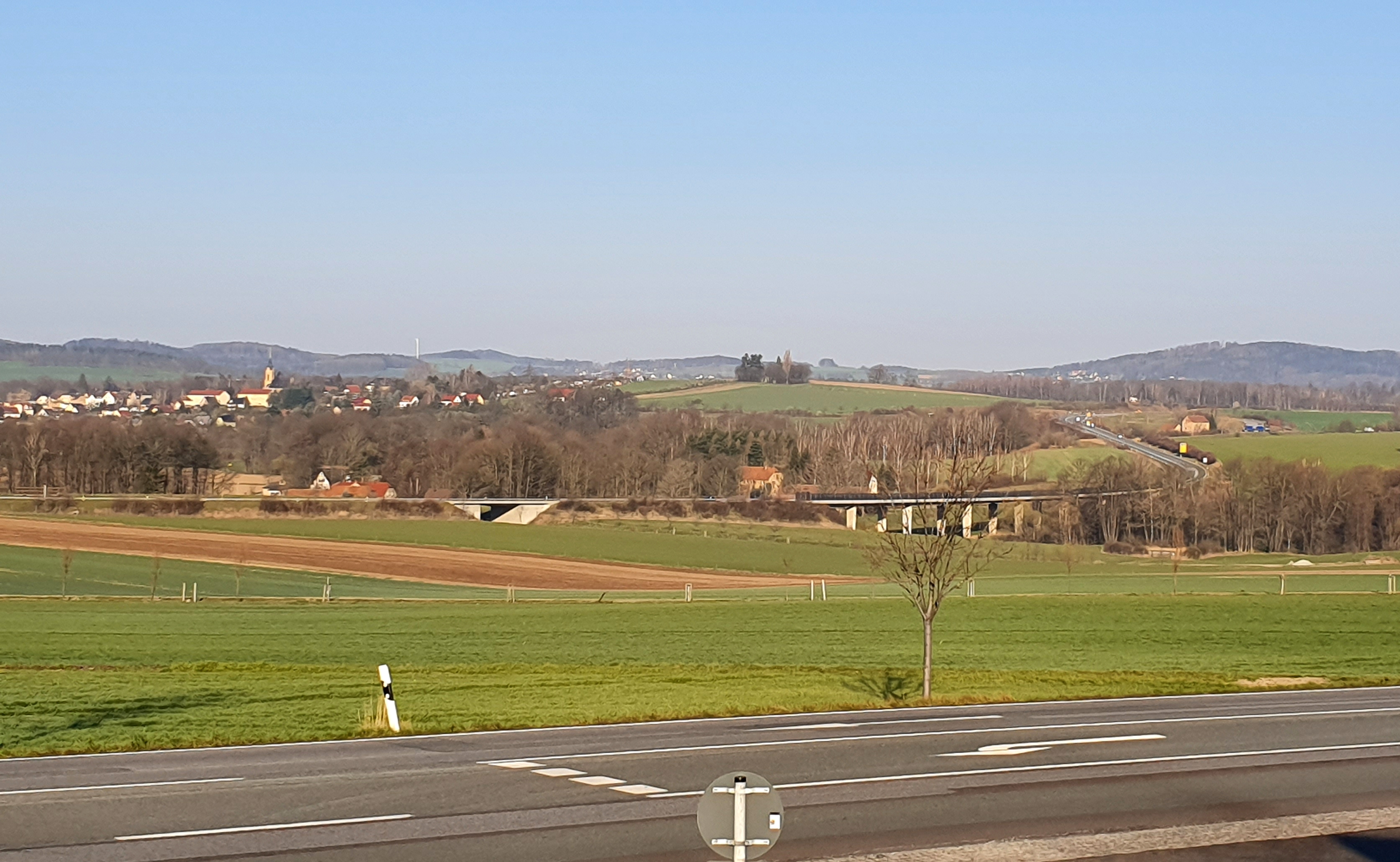 B 178